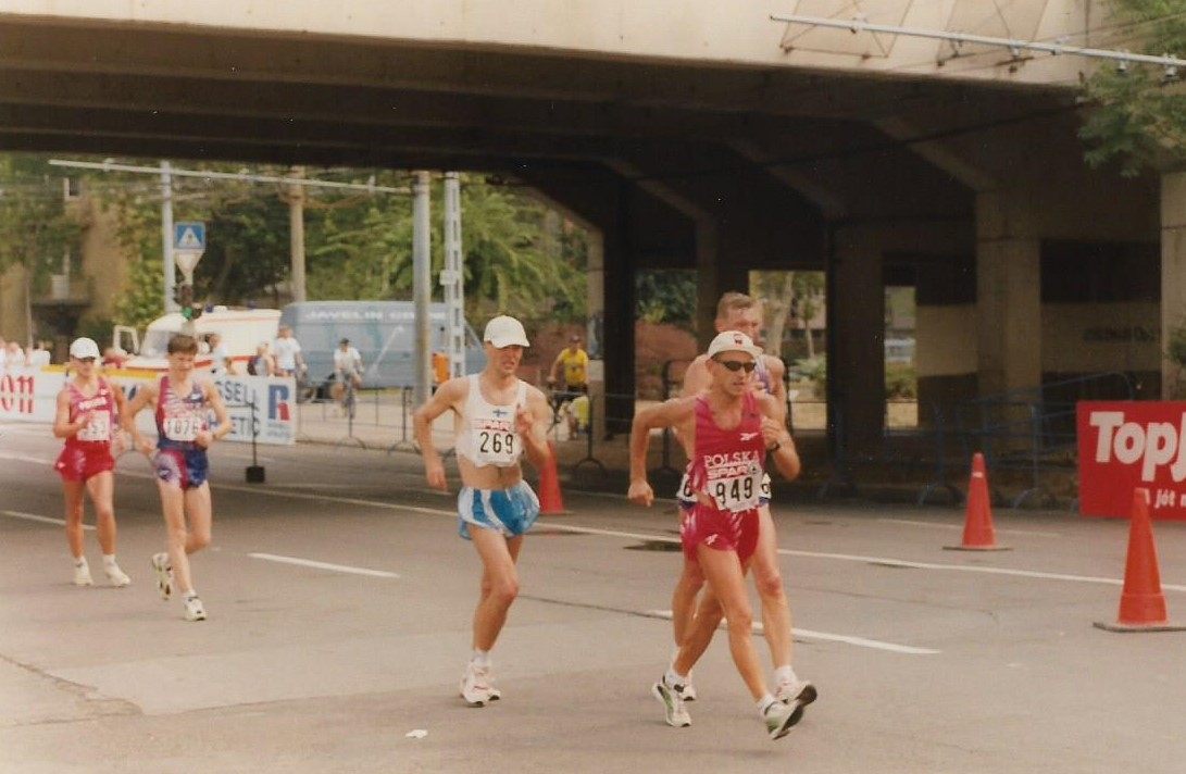 Valentin Kononen (269), Robert Korzeniowski (949) ja Andrei Plotnikov (Korzeniowskin takana) karkaamassa Oleg Ishutkinilta (1076) ja Tomasz Lipiecilta (953) 50 kilometrin kävelyn kärjessä Budapestin EM-kilpailuissa 21. elokuuta 1998.